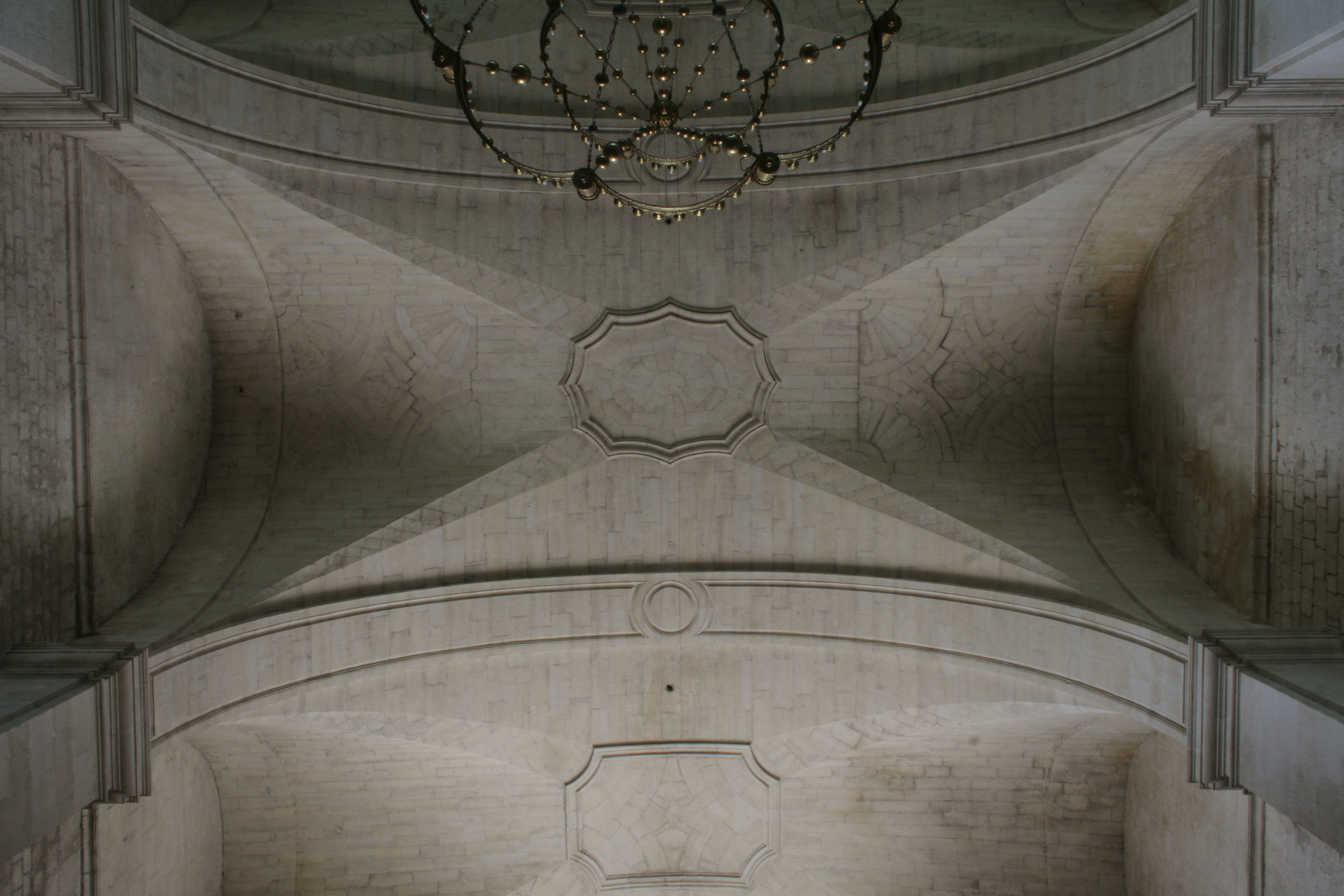 Gewölbedecke, doppeltes Kreuzgratgewölbe der Kathedrale von Viviers, Architekt Jean-Baptiste Franque.